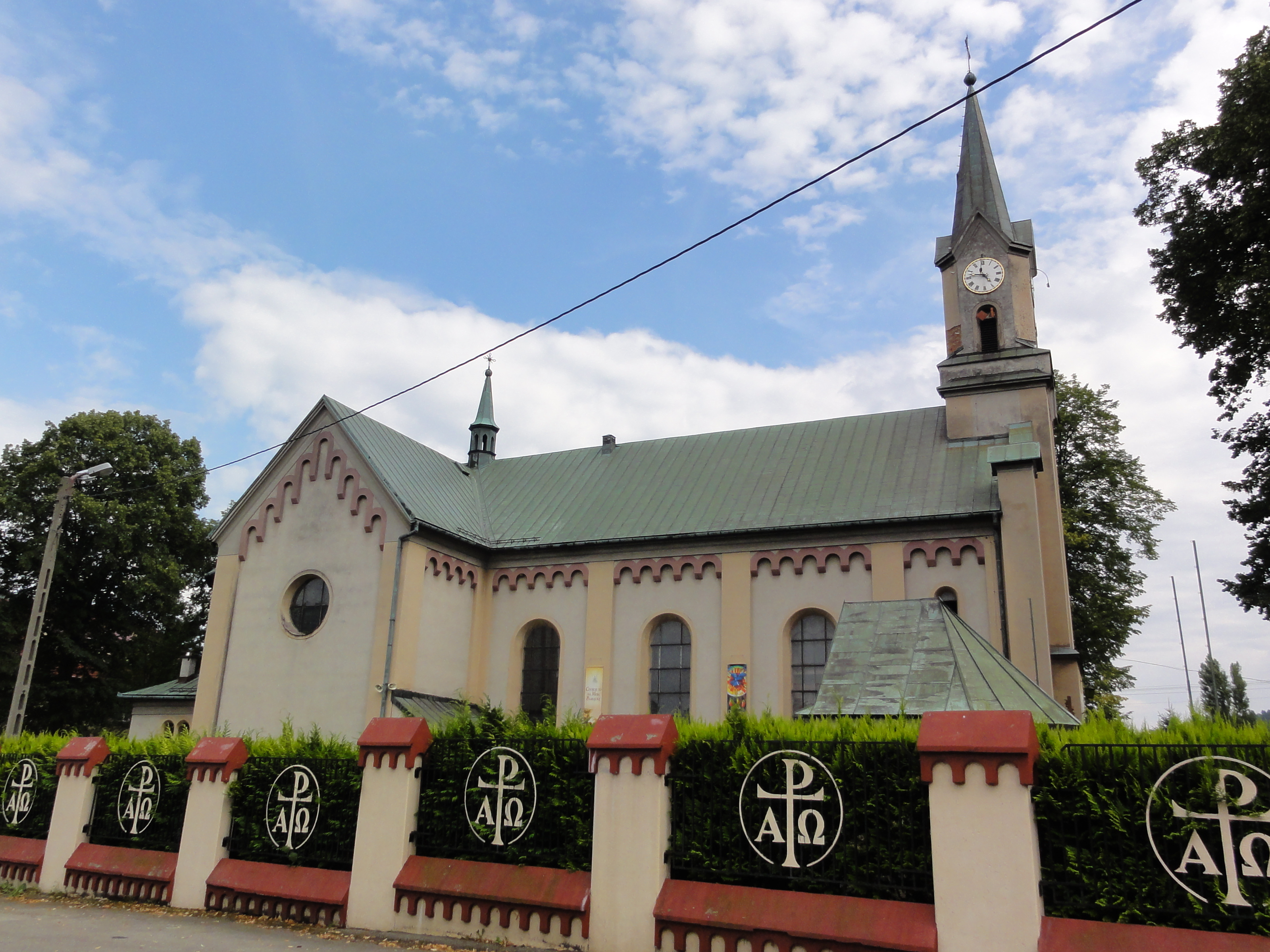 Kościół św. Marii Magdaleny w Międzybrodziu Bialskim